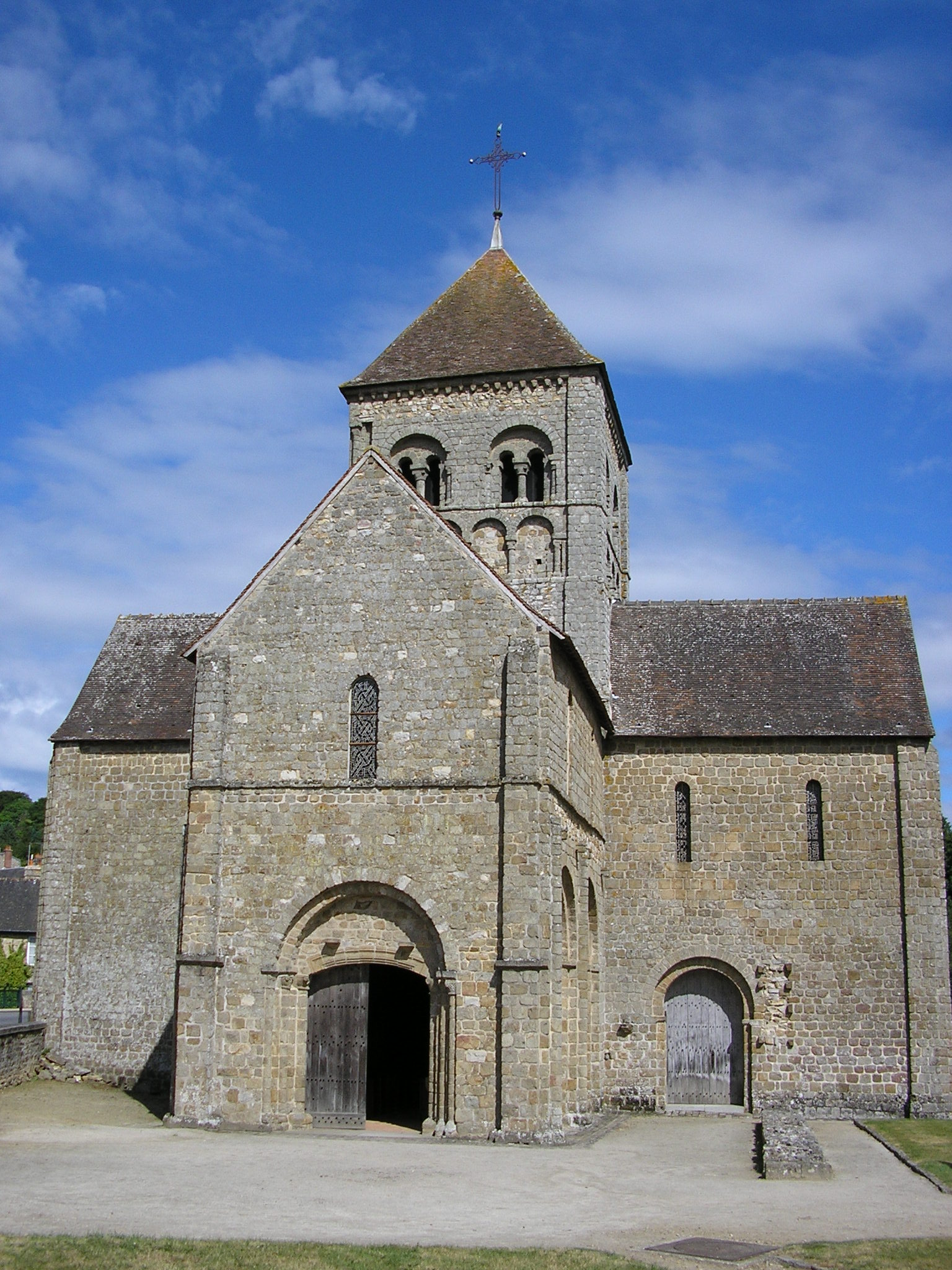 Eglise romane Notre dame sur l'eau